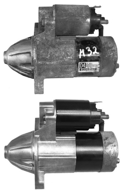 Пошкоджений в ході експлуатації та відновлений стартер